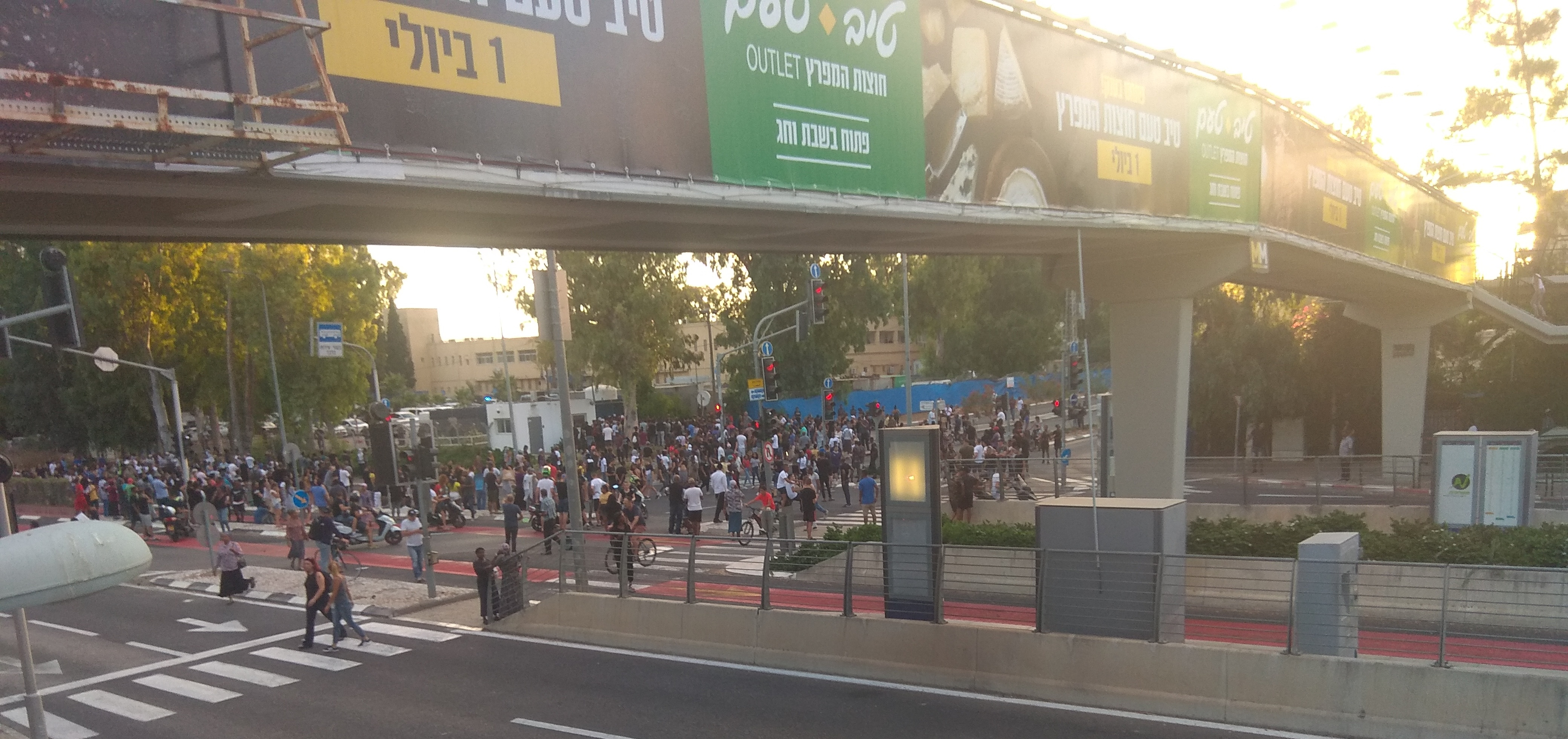 מפגינים ליד משטרת זבולון בקריית חיים